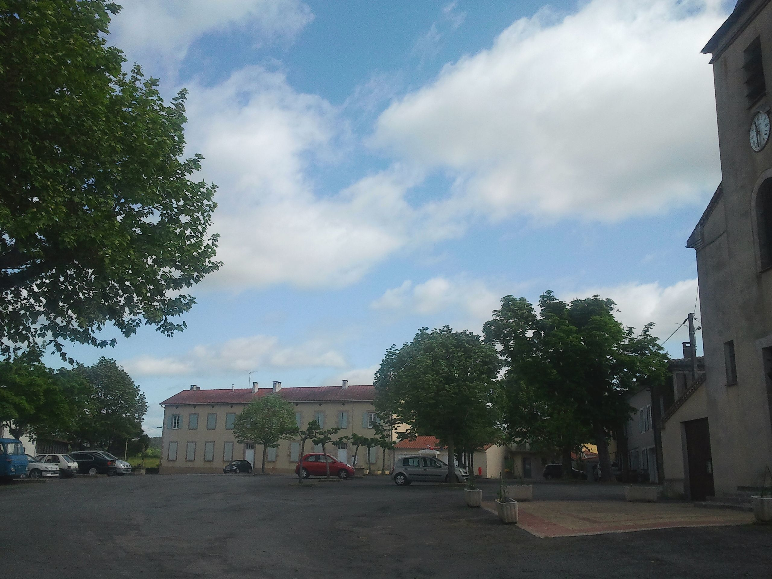 La place principale à Lafenasse